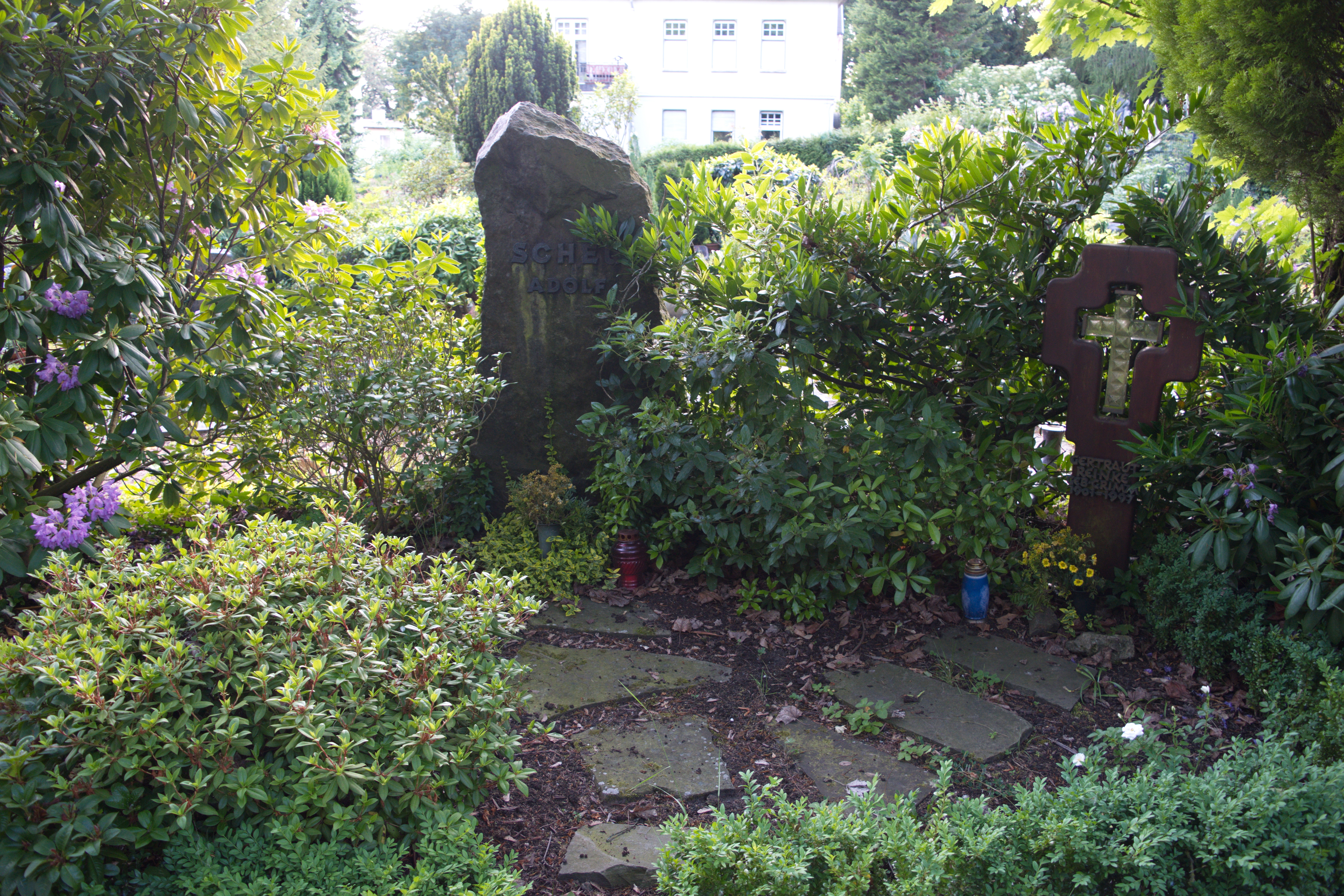 Kirchhofstraße, Wuppertal